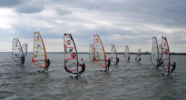 Соревнование по виндсерфингу